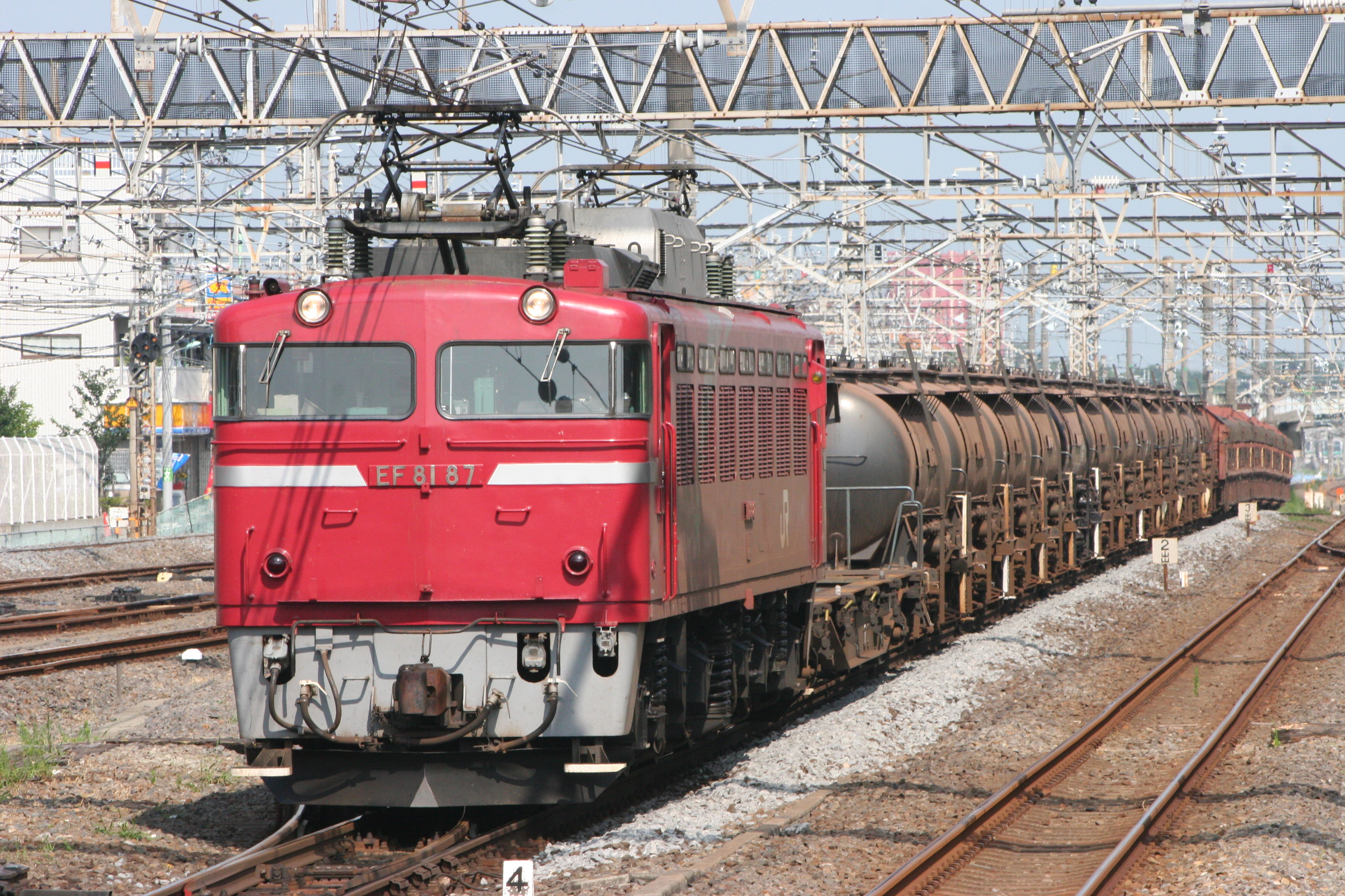 国鉄EF81形電気機関車87号車